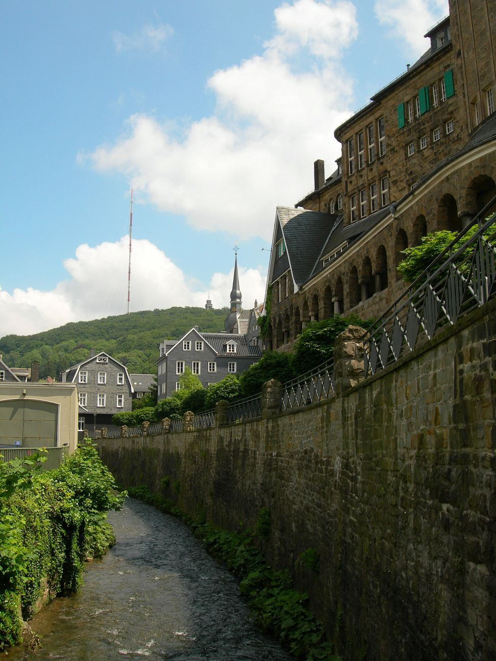 Sender Langenberg,D-Velbert,vorne Deilbach, rechts Bürgerhaus